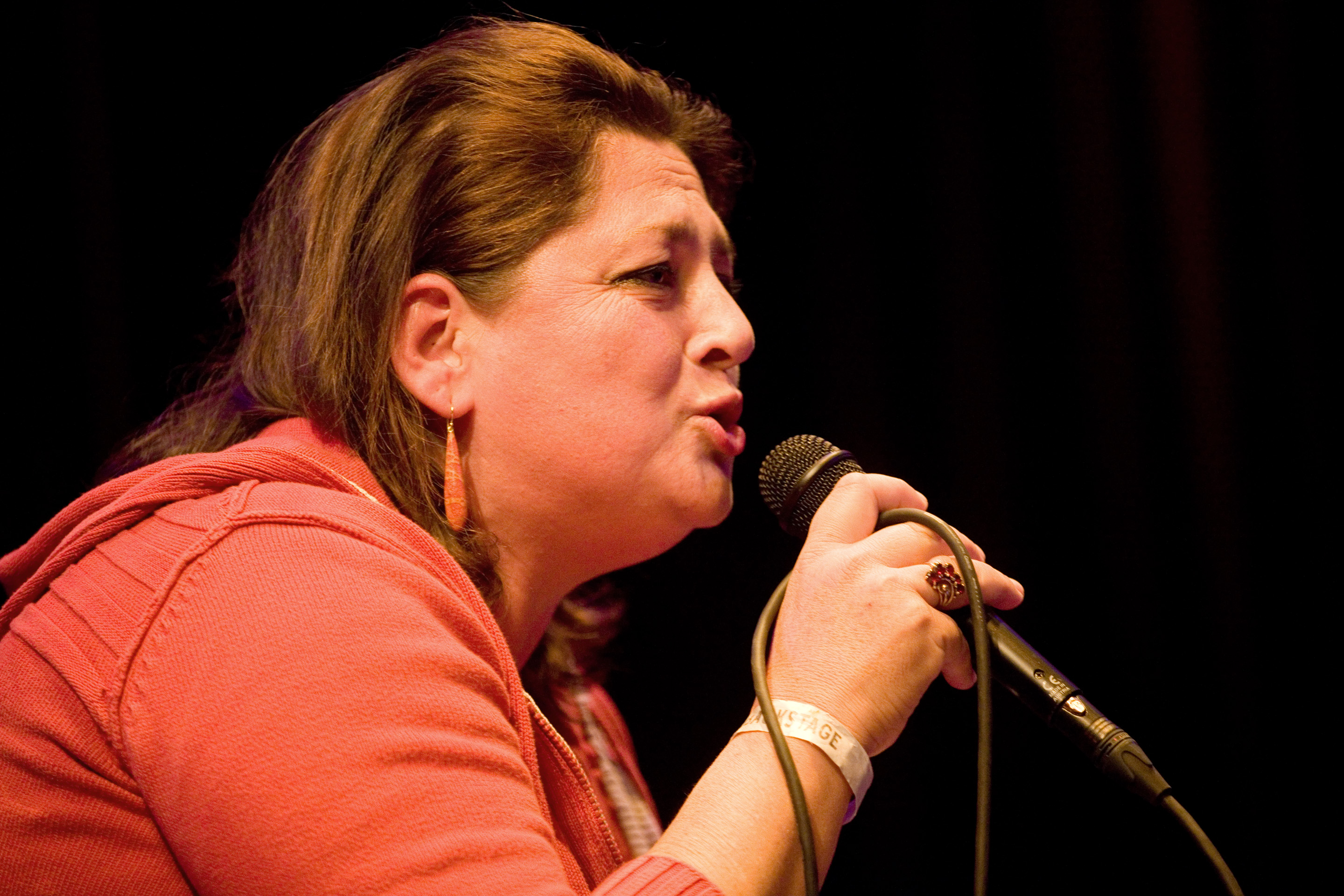 Annet Malherbe